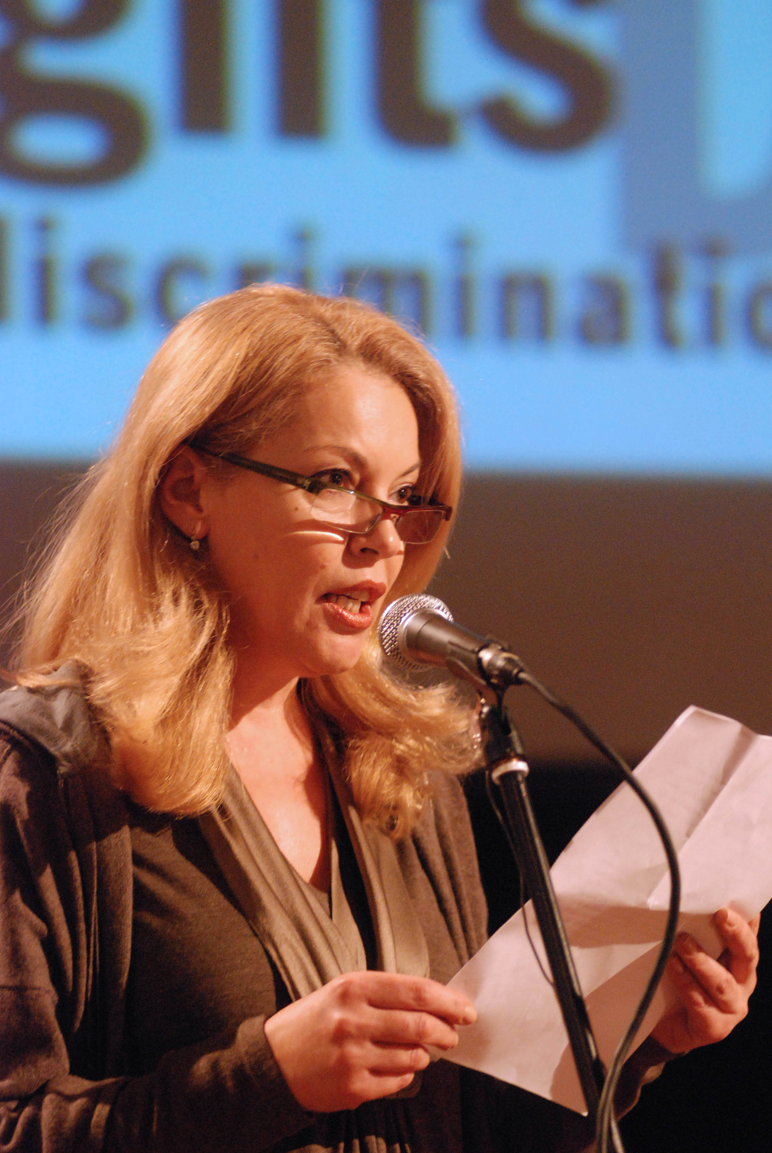 Predsednica Fonda "Dr Zoran Đinđić" Ružica Đinđić na predstavljanju studije povodom Međunarodnog dana ljudskih prava, u Studentskom kulturnom centru Beograda (10. decembar 2009); autor: Nenad Stojanović, Foto servis DS (posetite